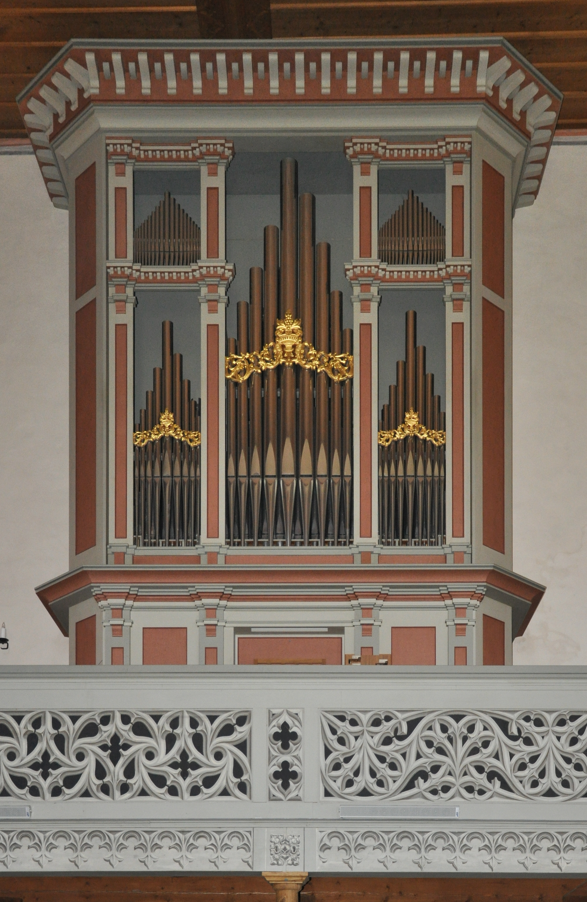 Hallau (Kanton Schaffhausen), Bergkirche St. MoritzOrgel, erbaut 1978 von Th. Kuhn AG (Männedorf).